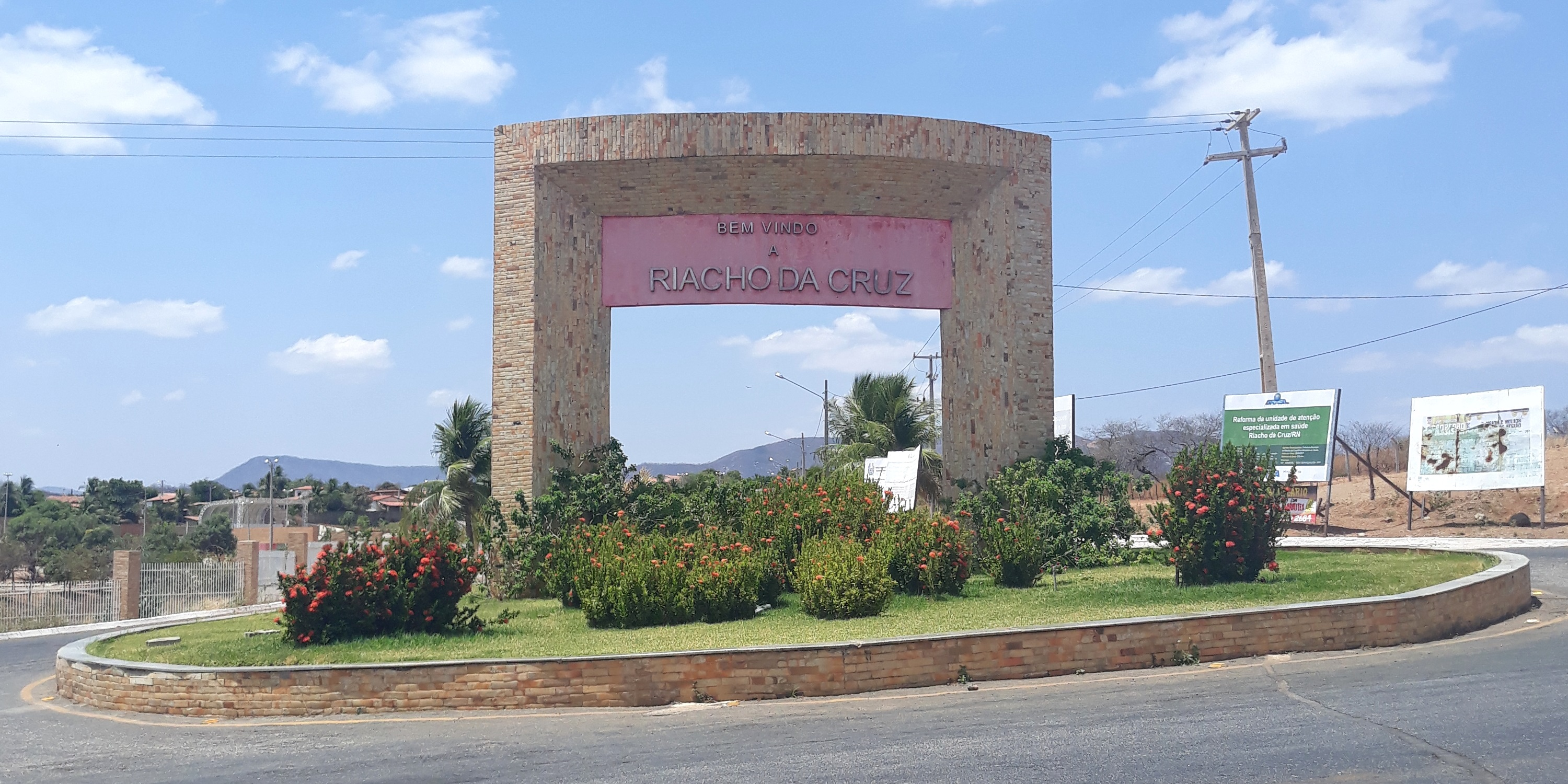 Português do Brasil: Pórtico de entrada de Riacho da Cruz, Rio Grande do Norte (Brasil)